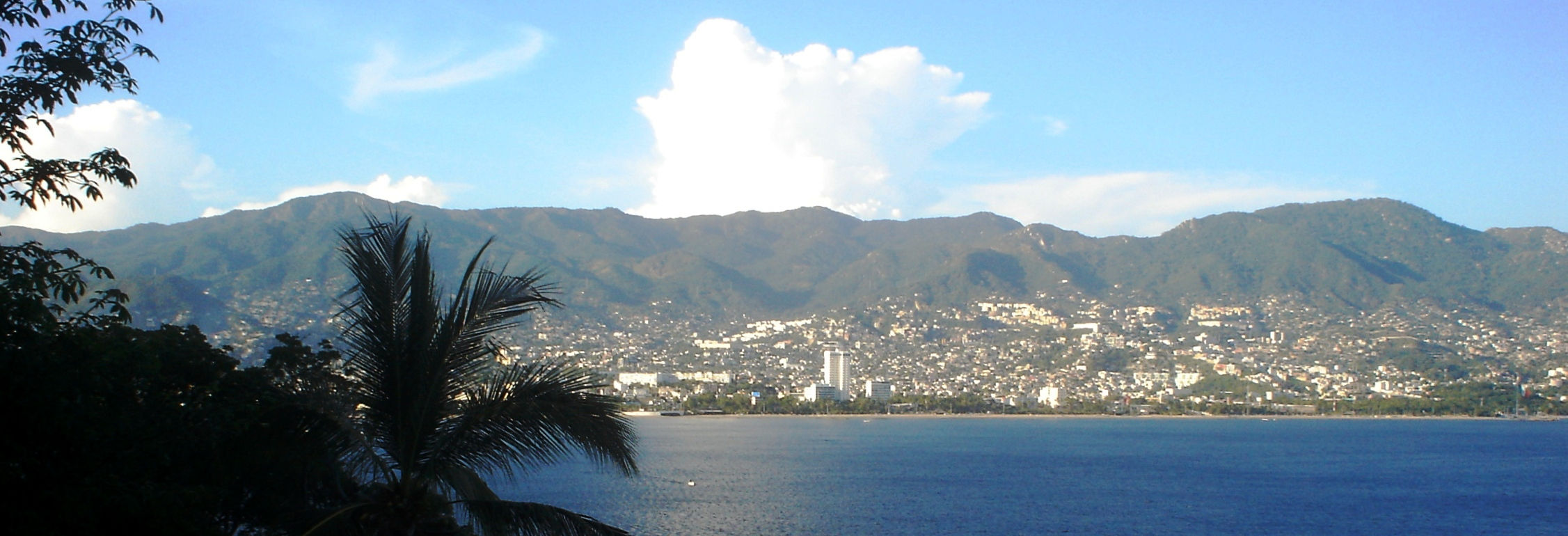 El parque Nacional El Veladero en la parte alta de la ciudad y puerto de Acapulco, Guerrero.